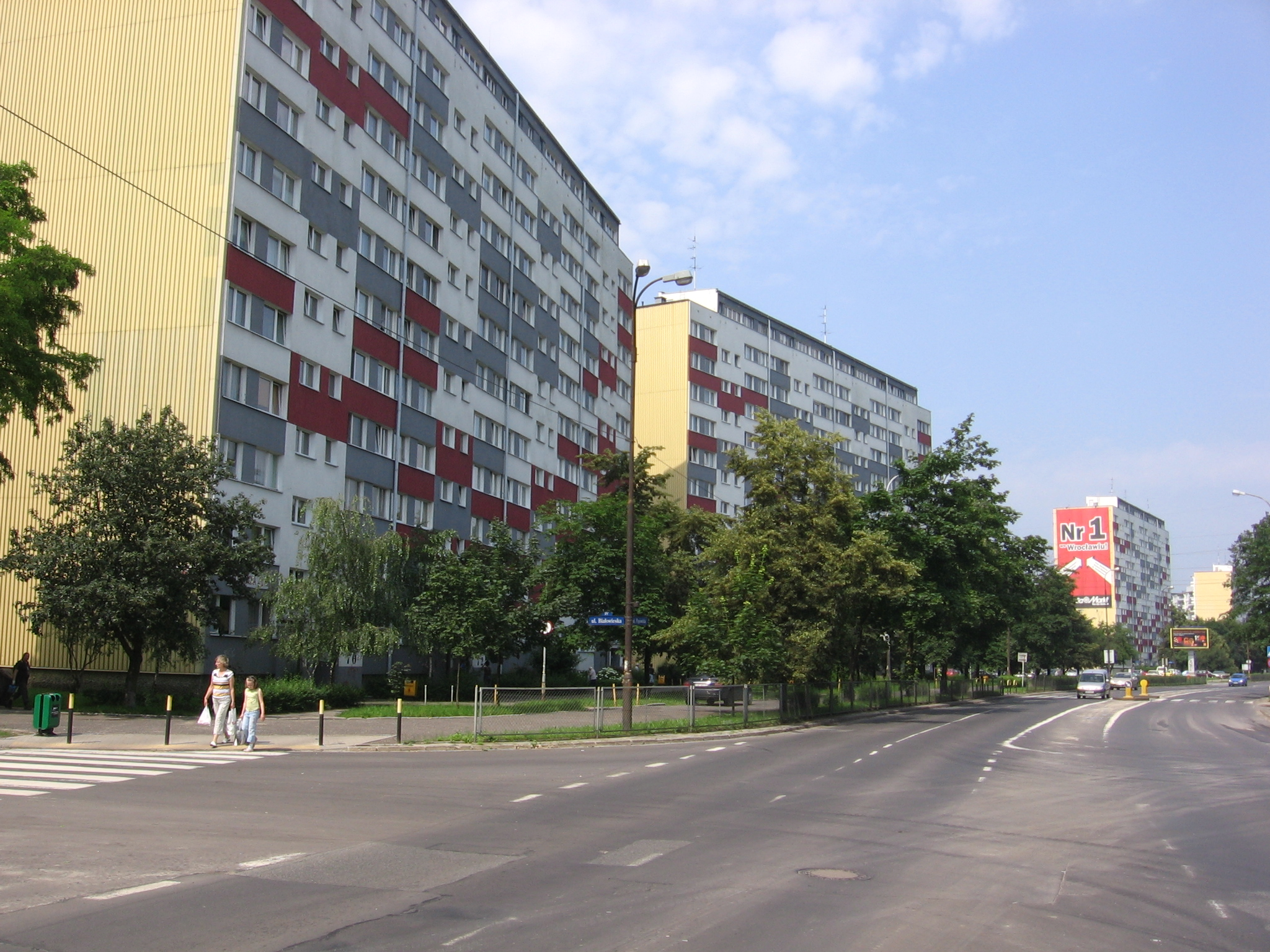 ulica Legnicka we Wrocławiu, odcinek od skrzyżowania z Białowieską na północny zachód